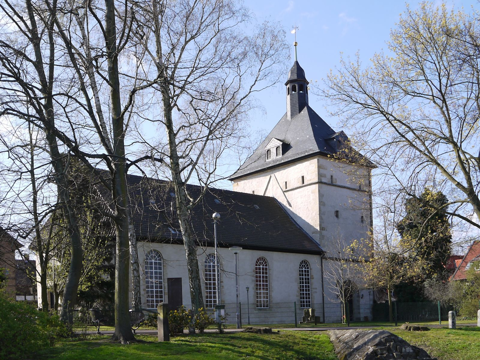 Kirche St. Mariae-Jakobi in Salzgitter-Bad (Nordseite)